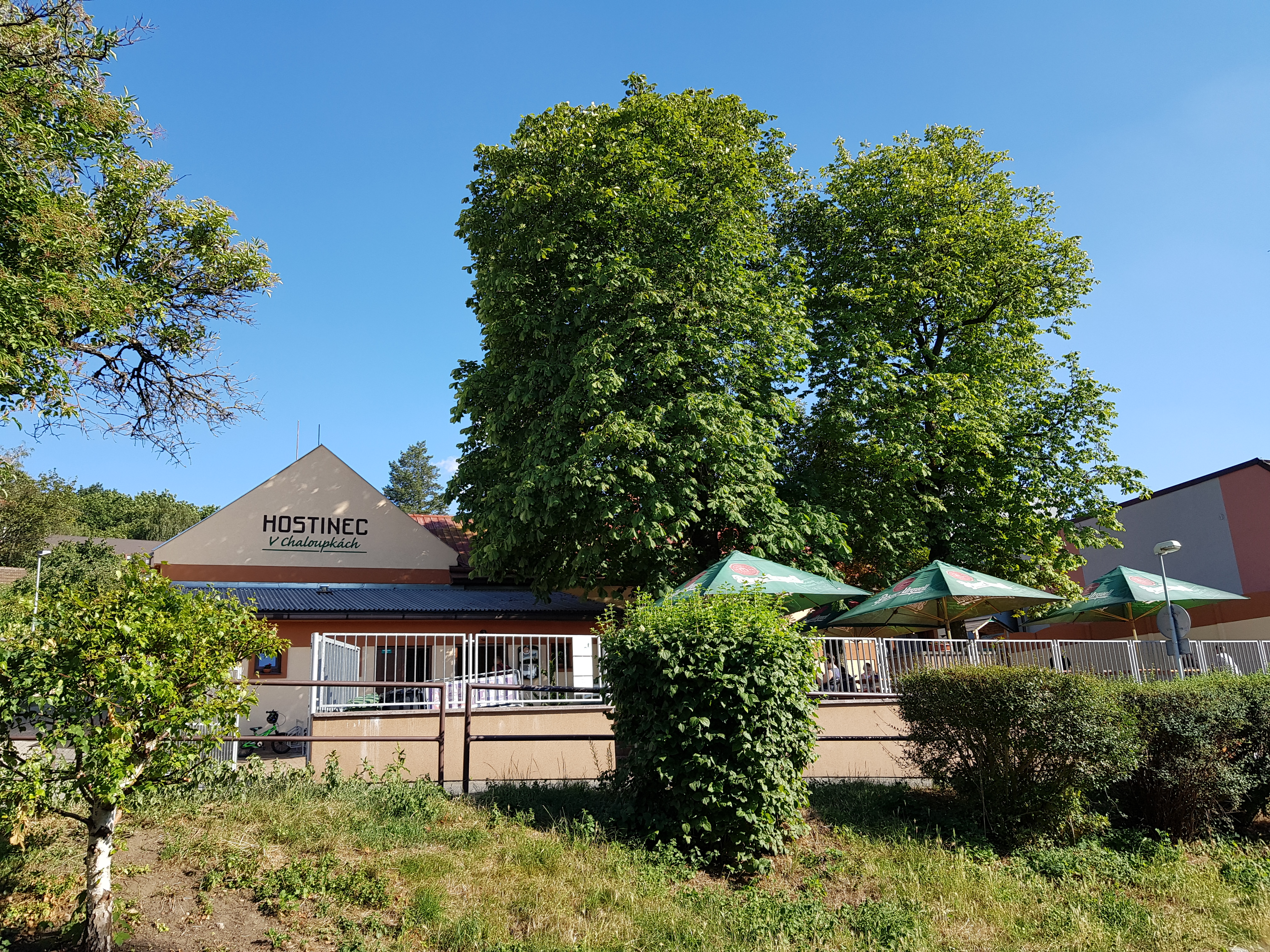 Hostinec V Chaloupkách, V Chaloupkách 24/54, Praha 14-Hloubětín